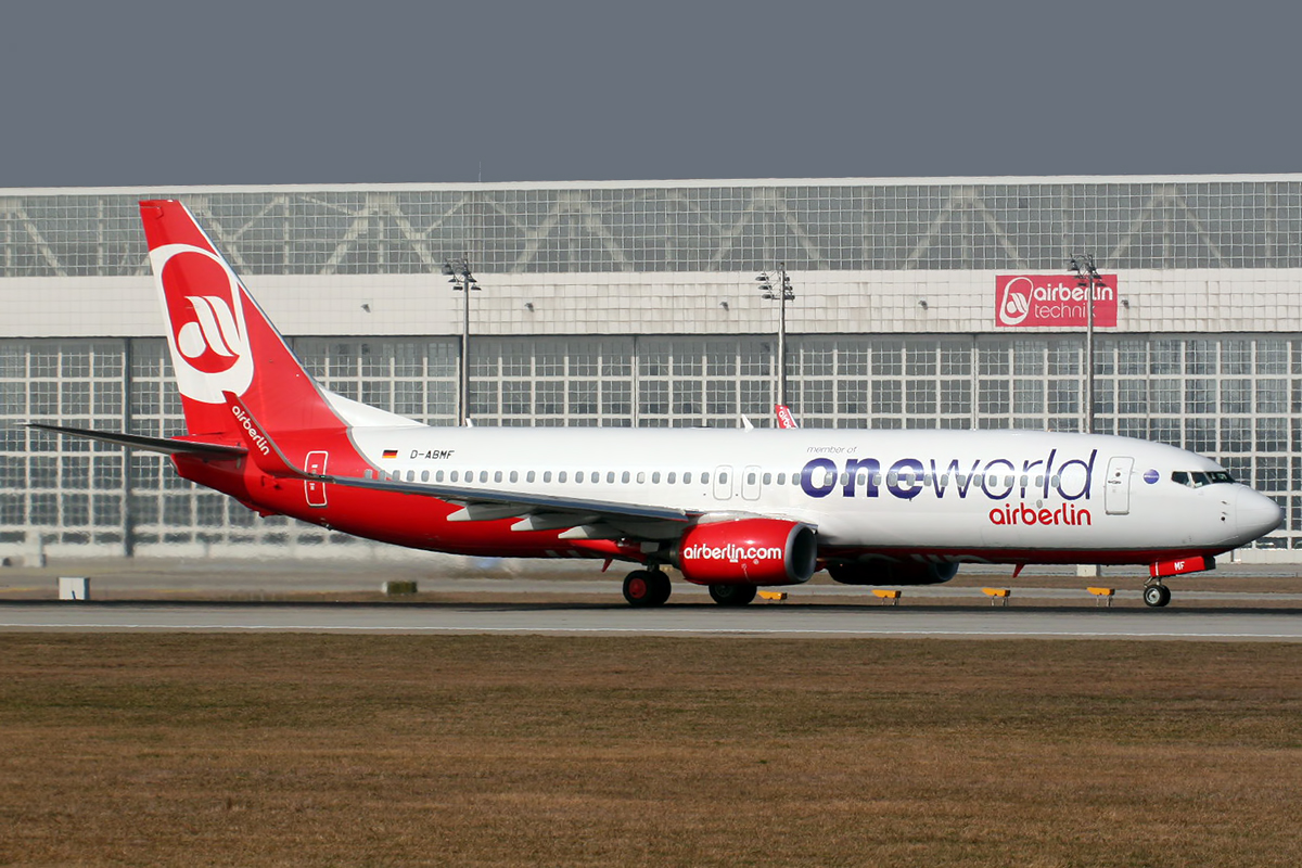 Munich (EDDM/MUC) Airport AB1077 Munich-Faro